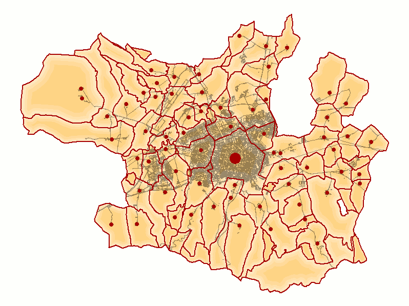 Gasteizko administrazio batzarren lurraldeen mugak